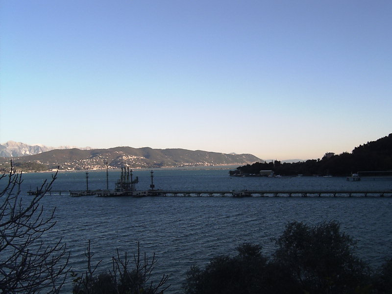 Il molo del rigassificatore di Panigaglia (Portovenere, SP). Sullo sfondo la "costa di levante" del Golfo della Spezia: da sinistra a destra si distinguono gli abitati di Lerici, Serra, Tellaro. A sinistra si intravede il profilo delle Alpi Apuane.